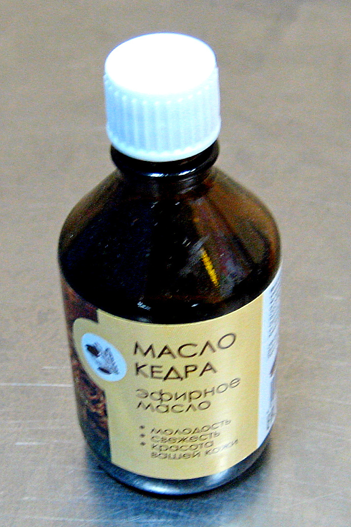 Масло кедра (эфирное масло). Надпись на фуфырике: "Молодость, свежесть, красота вашей кожи".